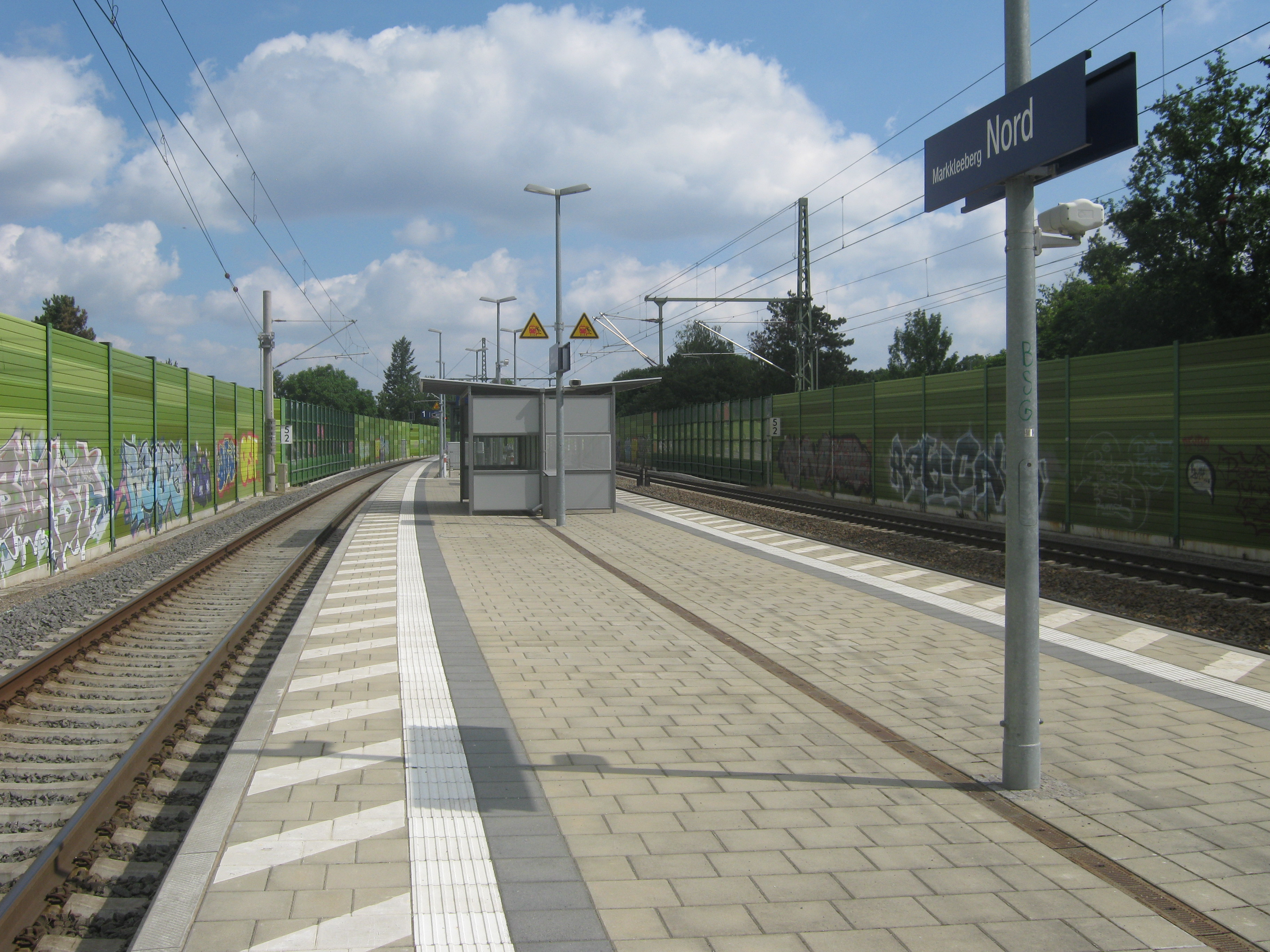 Im Zuge des City-Tunnel-Baus wurde bei der EÜ Breitscheidstraße der insgesamt sechste Eisenbahnhalt in der Stadt Markkleeberg gebaut. Dabei handelt es sich um den Haltepunkt Markkleeberg Nord, welcher zum Zeitpunkt der Aufnahme von den S-Bahn-Linien S3, S5, S5x und S6 der S-Bahn Mitteldeutschland bedient wurde.